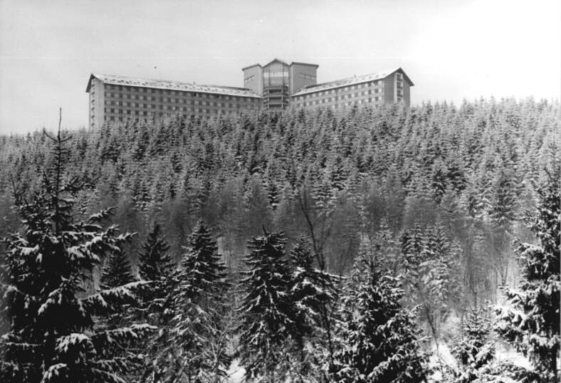 Blick auf das Ferienheim "Ringberghaus" ADN-ZB Schaar 14.1.1986 Hü Bez. Suhl: Jugend- Rund 900 Jugendliche aus der Land-, Forst- und Nahrungsgüterwirtschaft der Bezirke Karl-Marx-Stadt und Rostock verleben gegenwärtig ihren Winterurlaub im VdgB-Ferienheim "Ringberghaus" bei Suhl. Insgesamt werden sich ber 7800 junge Leute aus zwölf Bezirken der Republik in den kommenden vier Wochen in ausgewählten Urlaubsorten zwischen Rennsteig und Rhön erholen. Siehe dazu auch das Foto 1986-0114-11N